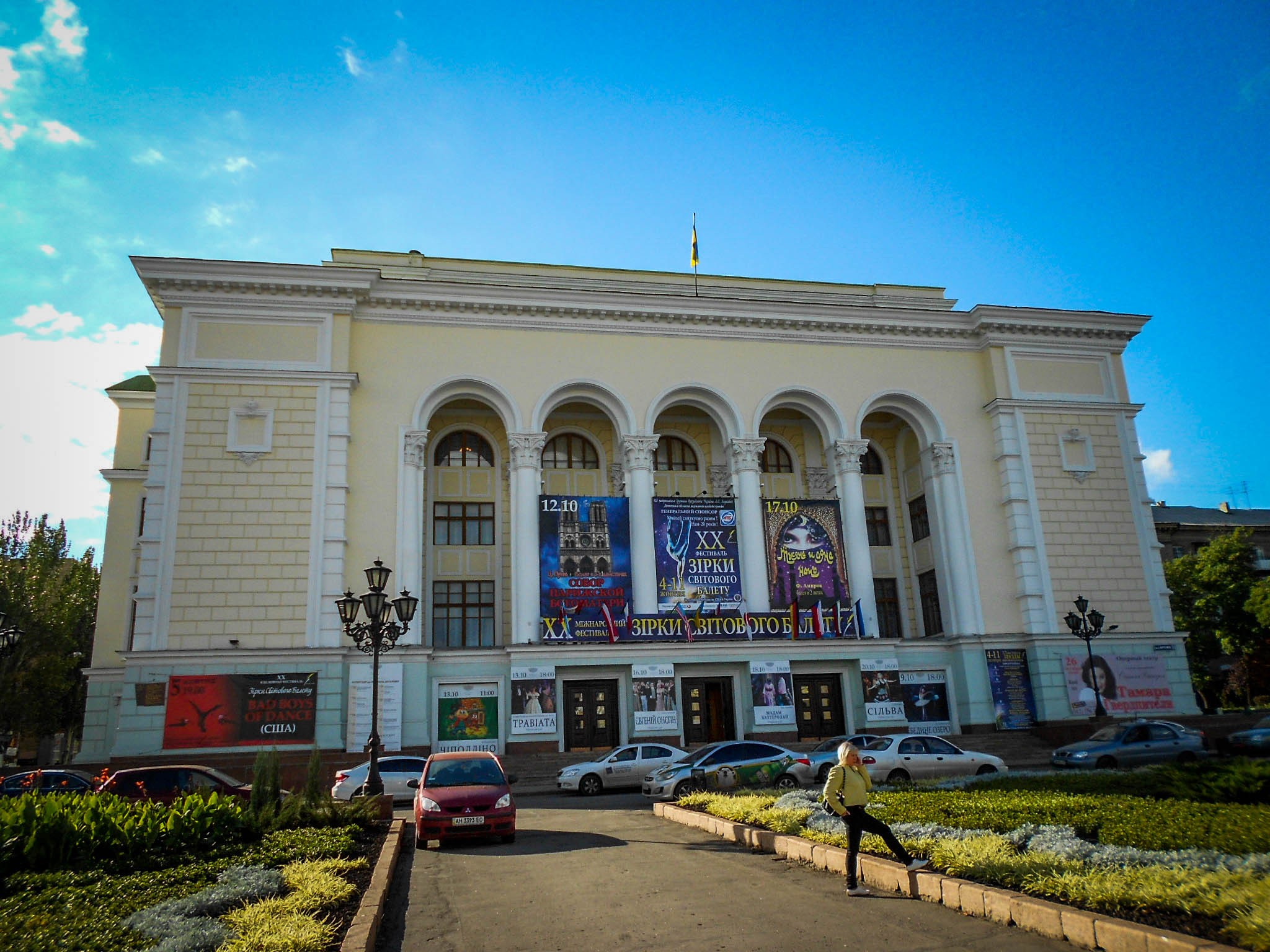 Державний академічний російський театр опери та балету (мур.) — будинок, на якому було піднято Червоний Прапор на честь звільнення міста, Донецьк, вул. Артема, 82